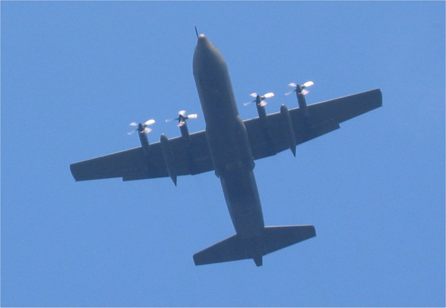 Hercules vliegtuig tijdens de dropping op de Ginkelse Heide op 16 september 2006